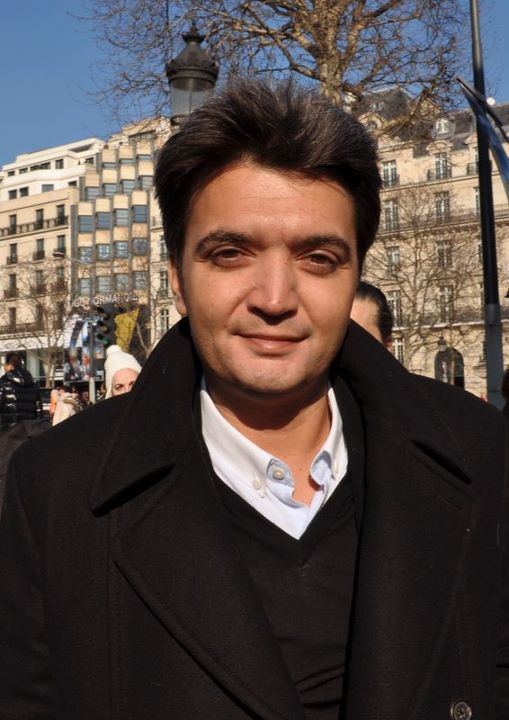 Thomas Langmann au déjeuner des nommés des César du cinéma